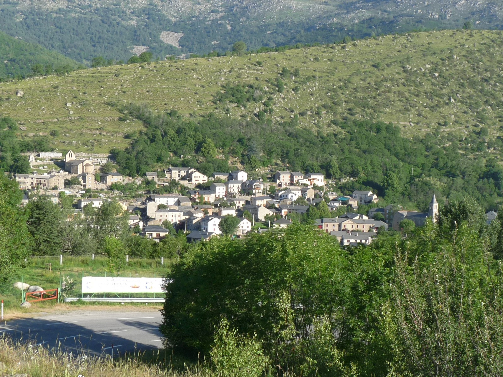 Angoustrine-Villeneuve-des-Escaldes, P.O., France